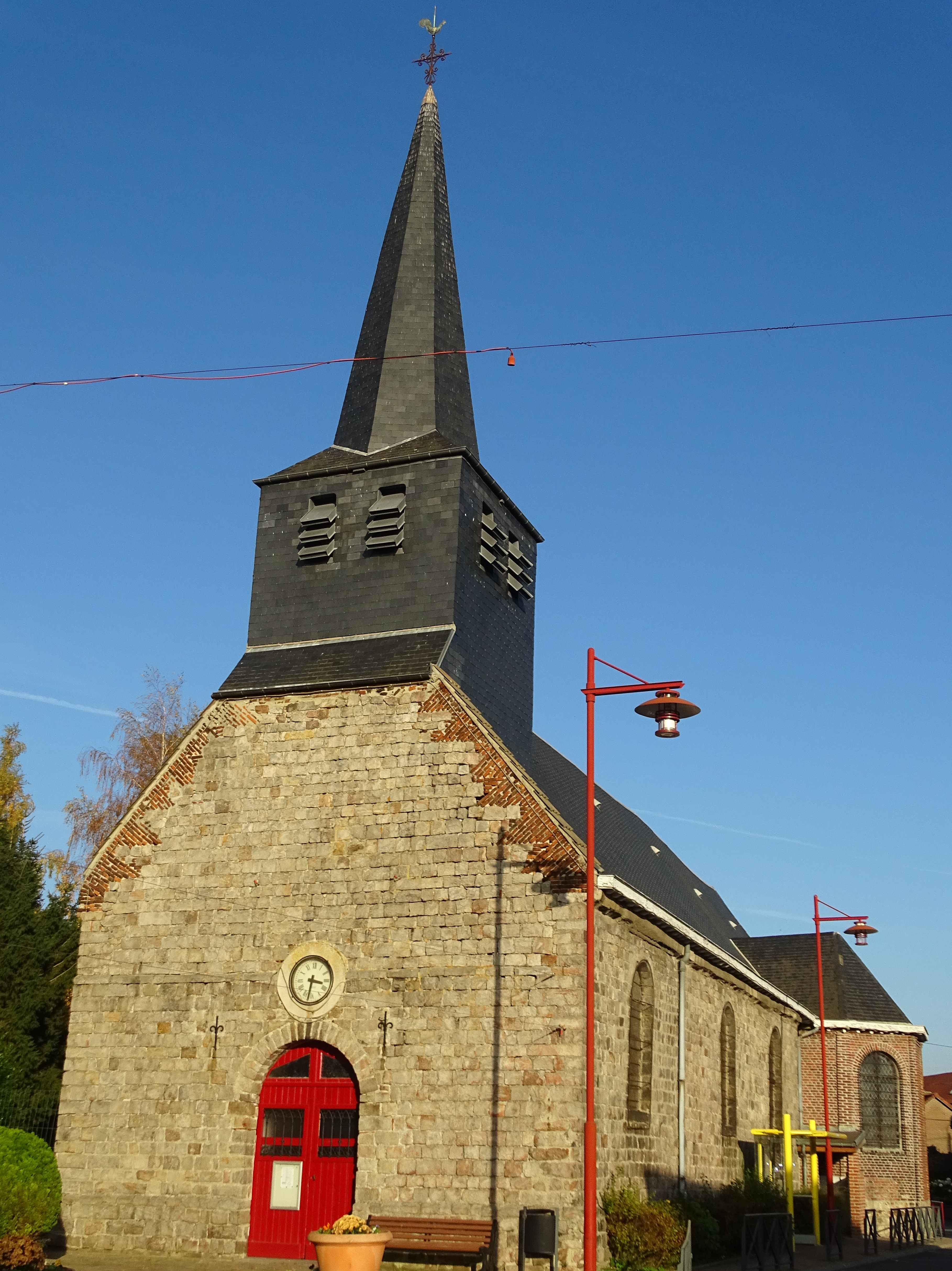 Depicted place: Église Saint-Samson de Bruille-lez-Marchiennes